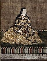 絹本著色中川秀成夫人像部分（中川秀成室、虎姫）、 大善寺所蔵・伝「洞仙院殿像」、京都国立博物館寄託、平成6年4月1日付け京都市有形文化財